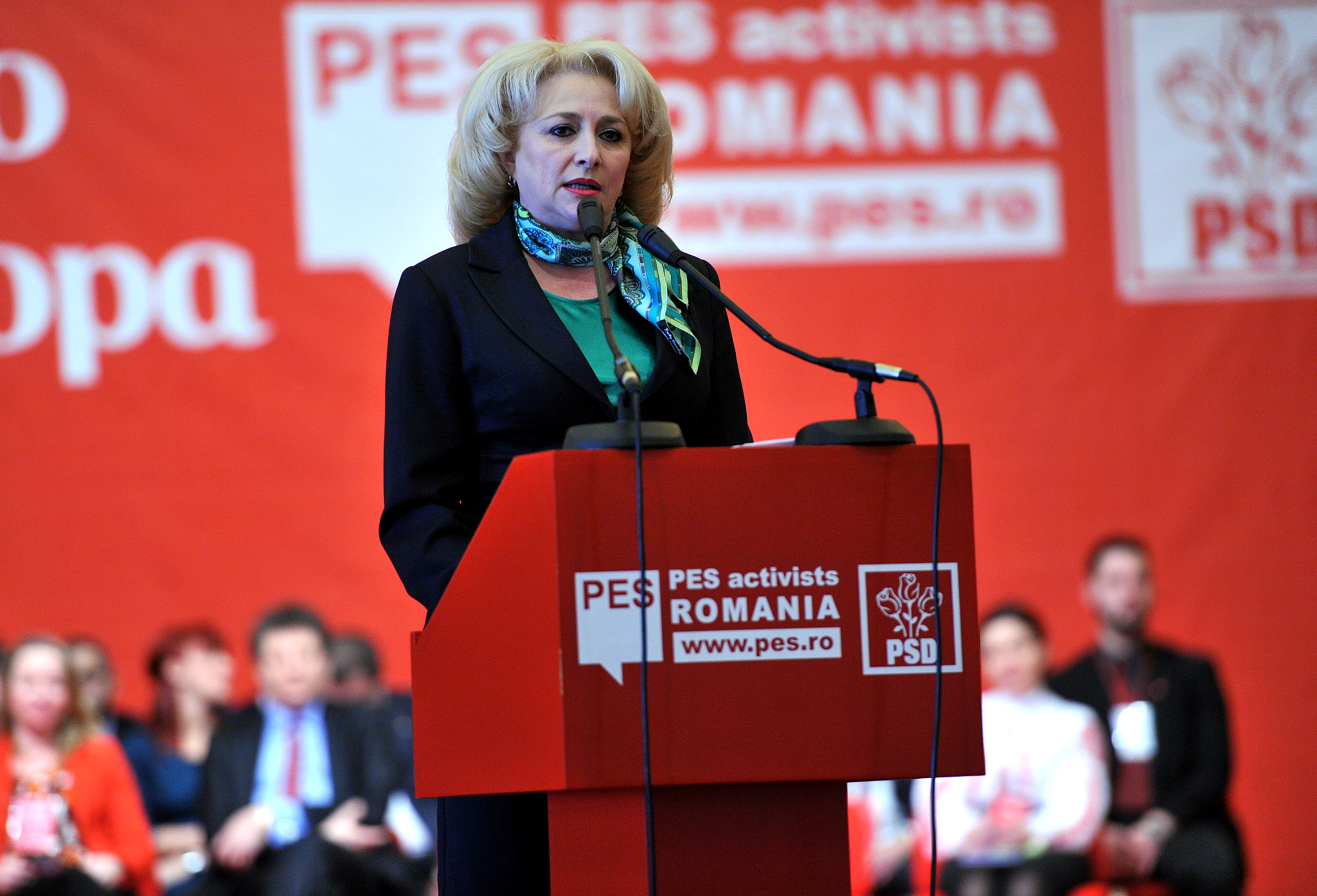 Viorica Dancila - PES Activists Romania, Palatul Parlamentului, Bucuresti - 08.02.2014 (2)